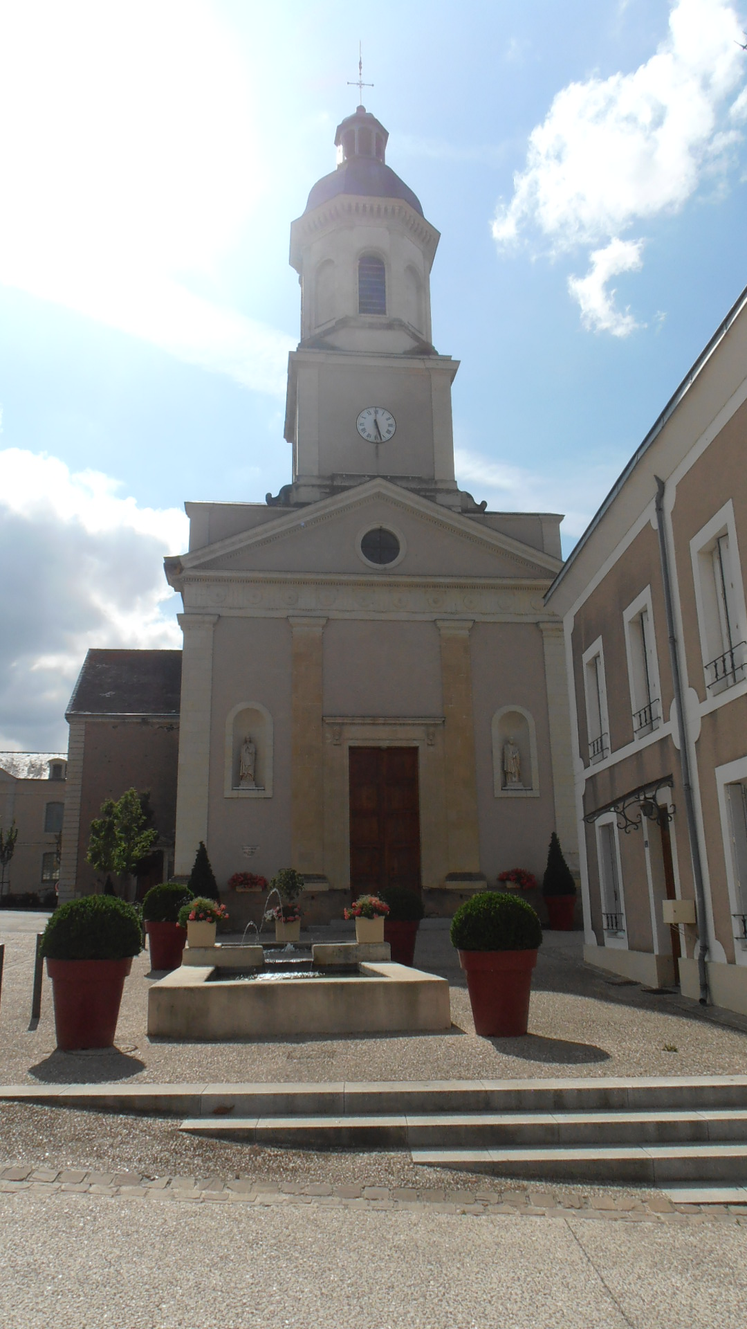 Église du Mesnil-en-Vallée (Maine-et-Loire, France).